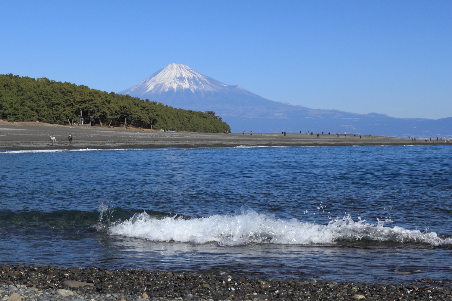 三保の松原, Miho no matsubara